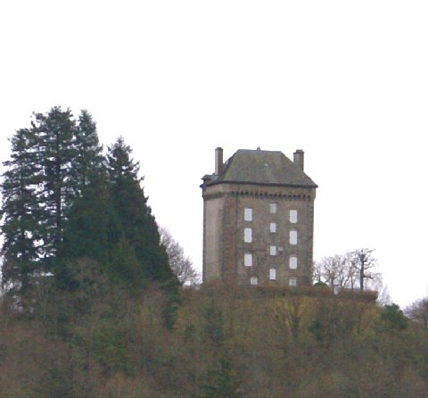 Château du Châtelet, village de Montfouilloux, commune de Ydes (Cantal. France)